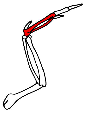 Bird_squeleton